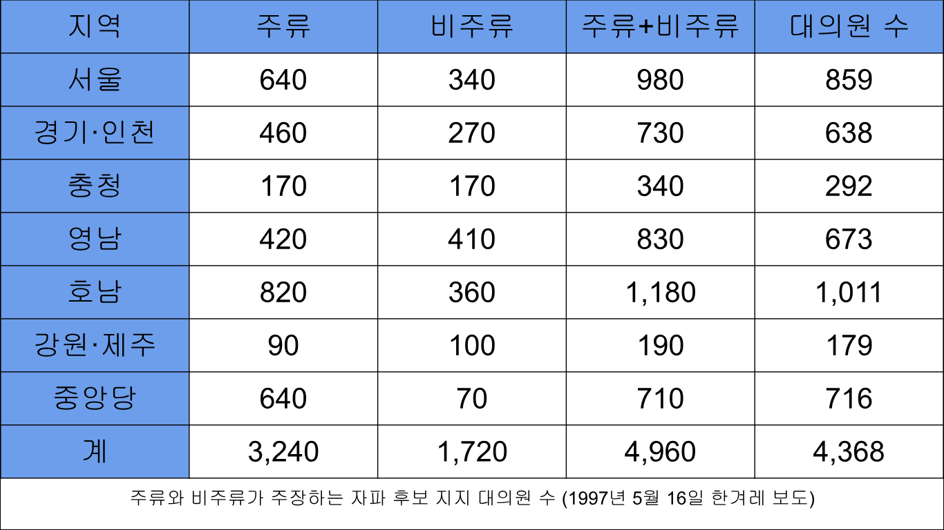 국민회의 대통령 후보 지명 전당대회 3일 전, DJ계와 비DJ계가 각각 주장한 대의원 판세를 당시 한겨레신문에서 정리한 내용